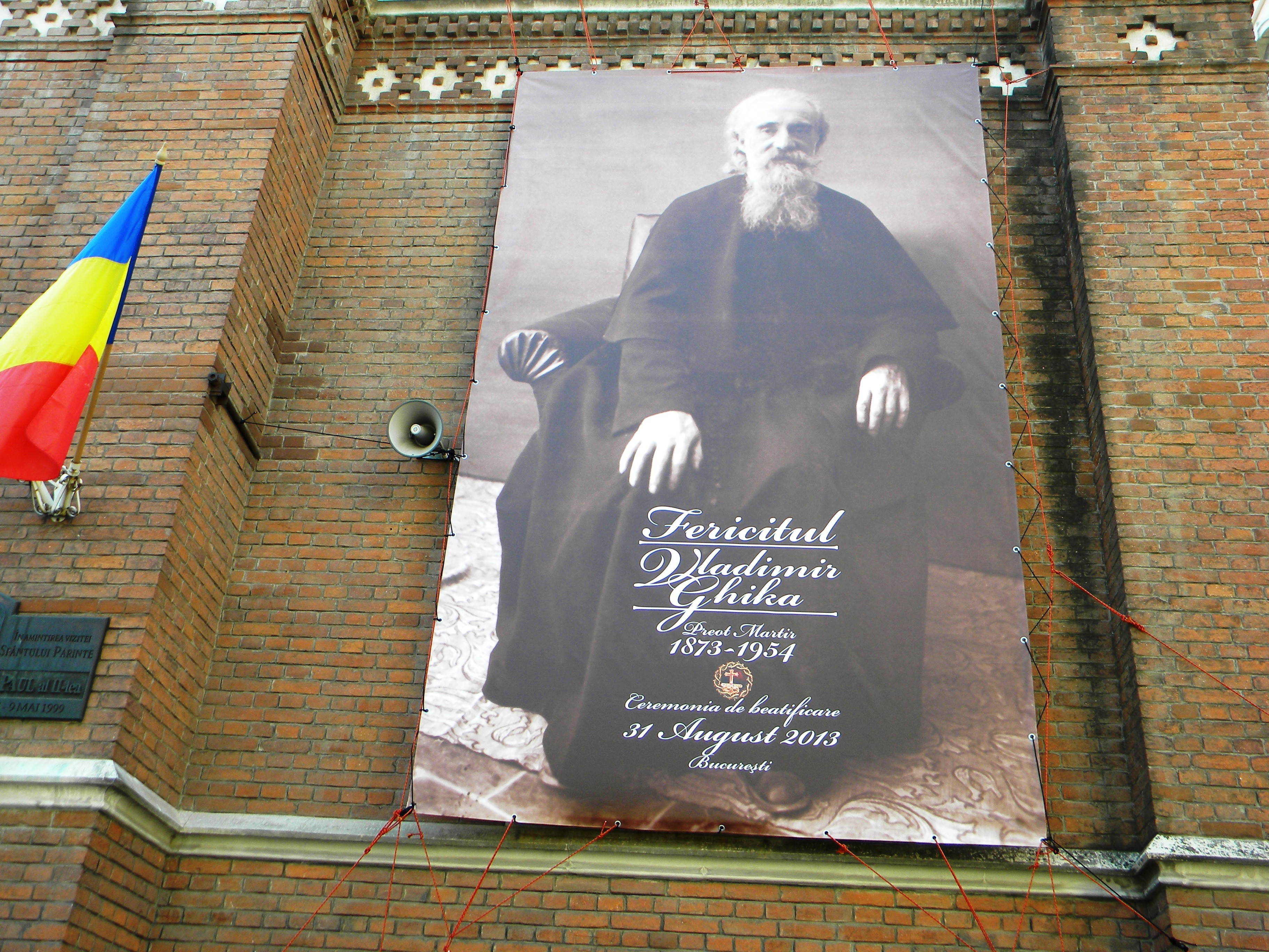 Catedrala Romano-Catolica "Sfantul Iosif,", Str. General Berthelot nr. 17, Bucuresti, sect. 1 (Imaginea Fericitului Vladimir Ghika)